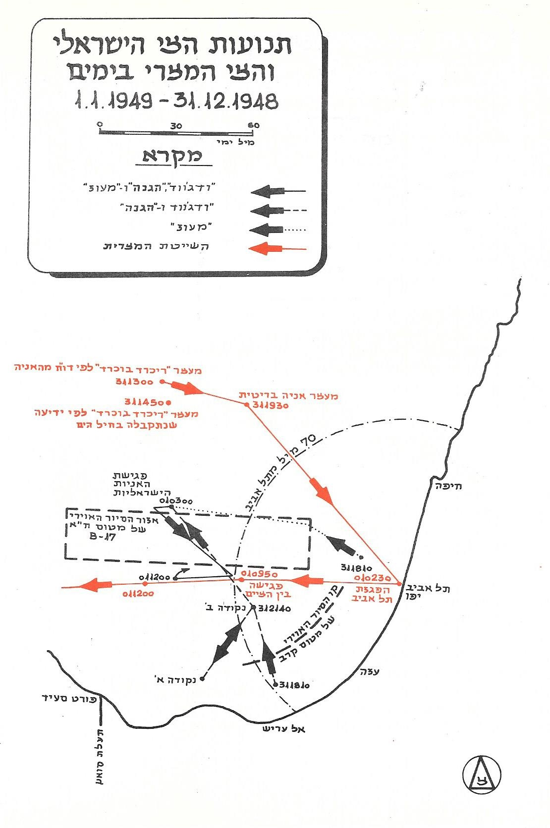 יזמה התקפית מצרית וקרב עם השייטת הגדולה 31.12.48 -1.1.1949